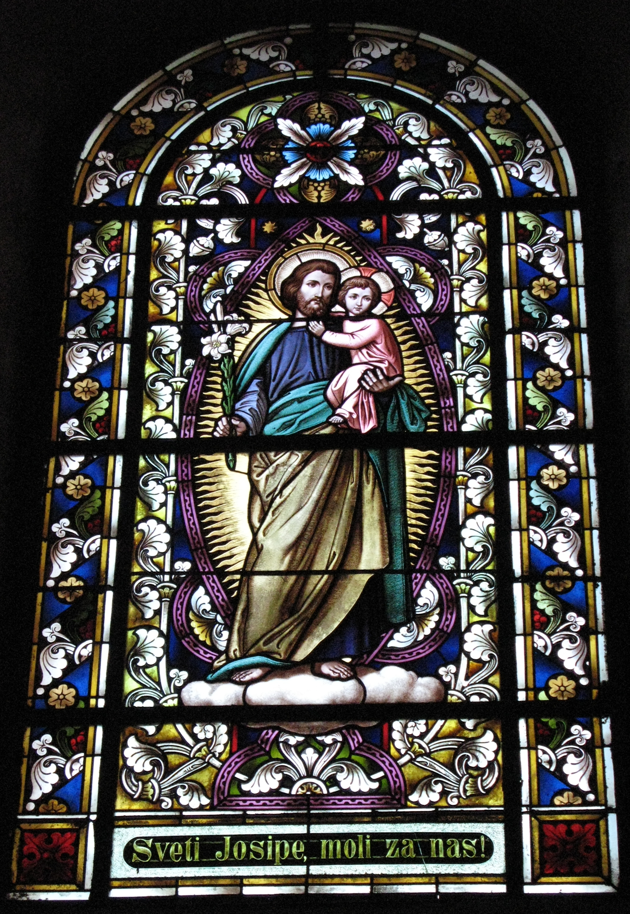 vitraj sv.Josipa u župnoj crkvi sv. Trojstva u Rovišću